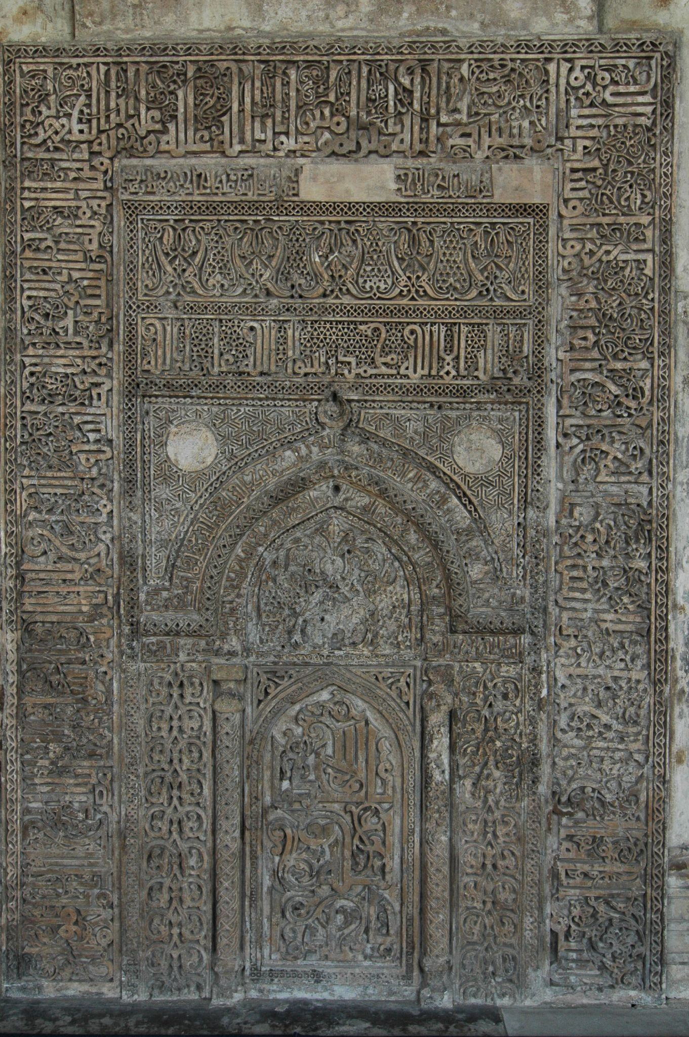 Cairo: Moschea di Ibn-Tulun